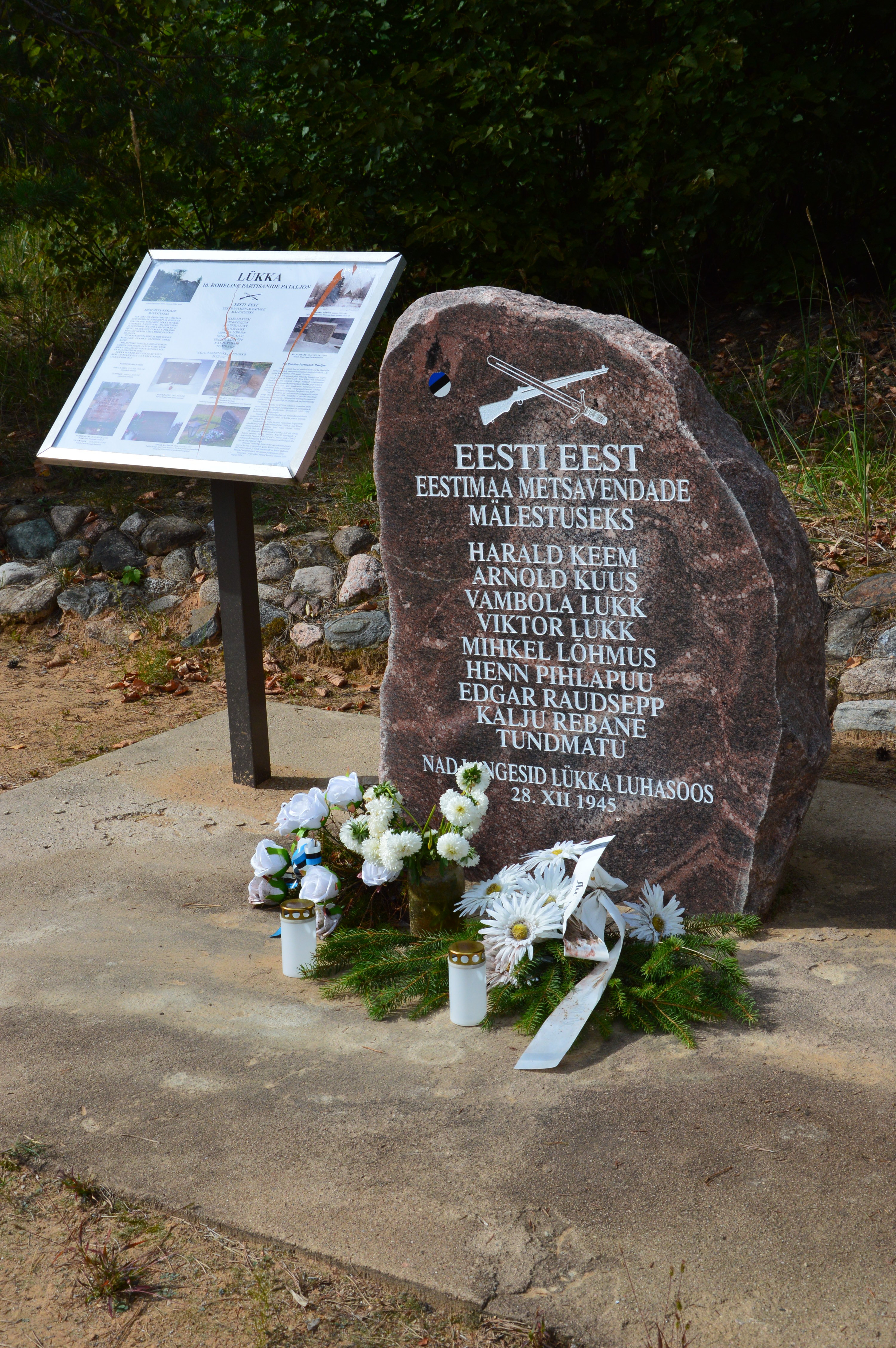 Mälestuskivi Lükka punkrilahingus langenud metsavendadele Võru-Mõniste-Valga tee ääres.